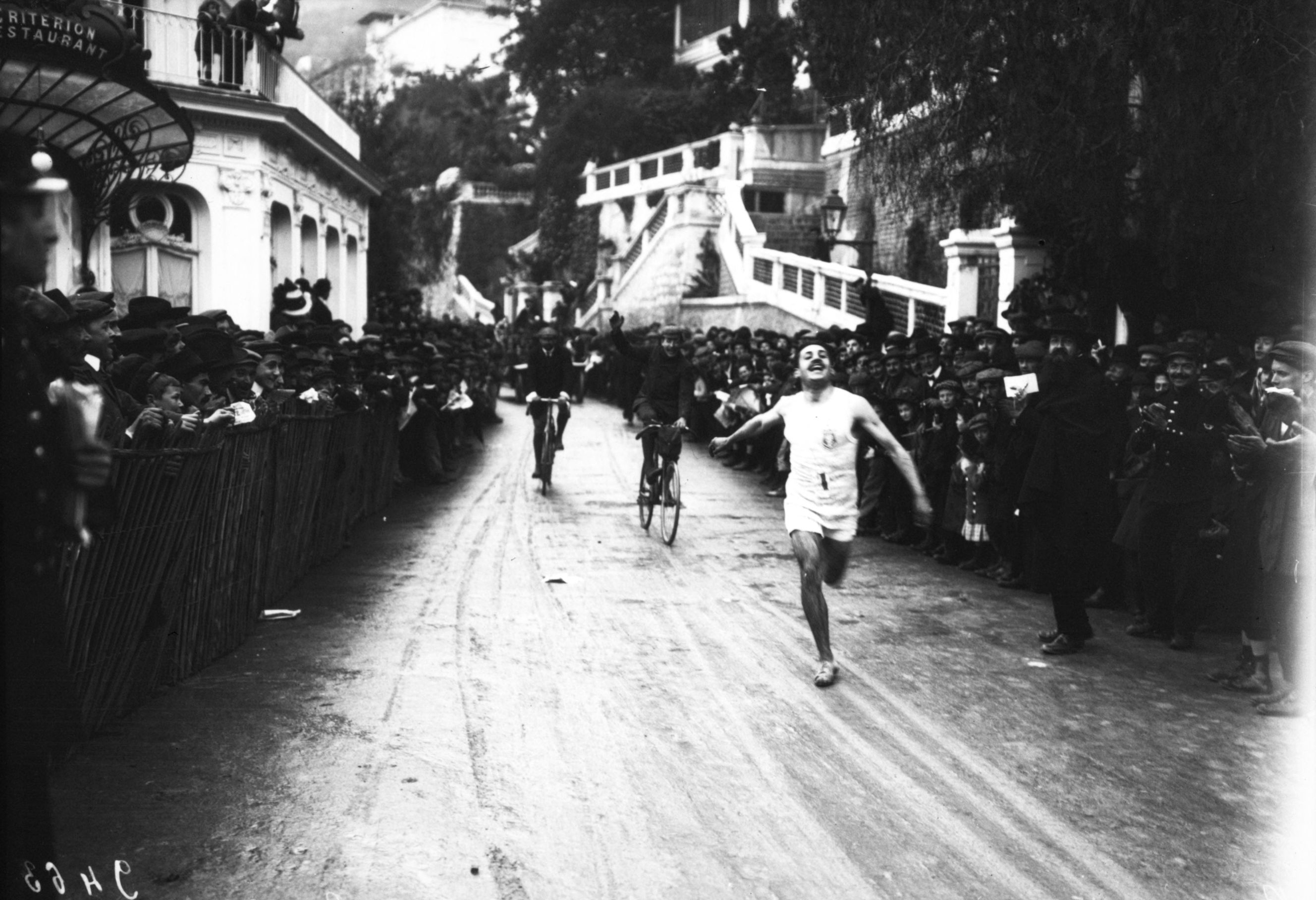 Bouin, 1er, arrivée de la course Nice-Monaco, 3 avril 1910 [course à pied].